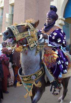 Horseman at Kano Durbar